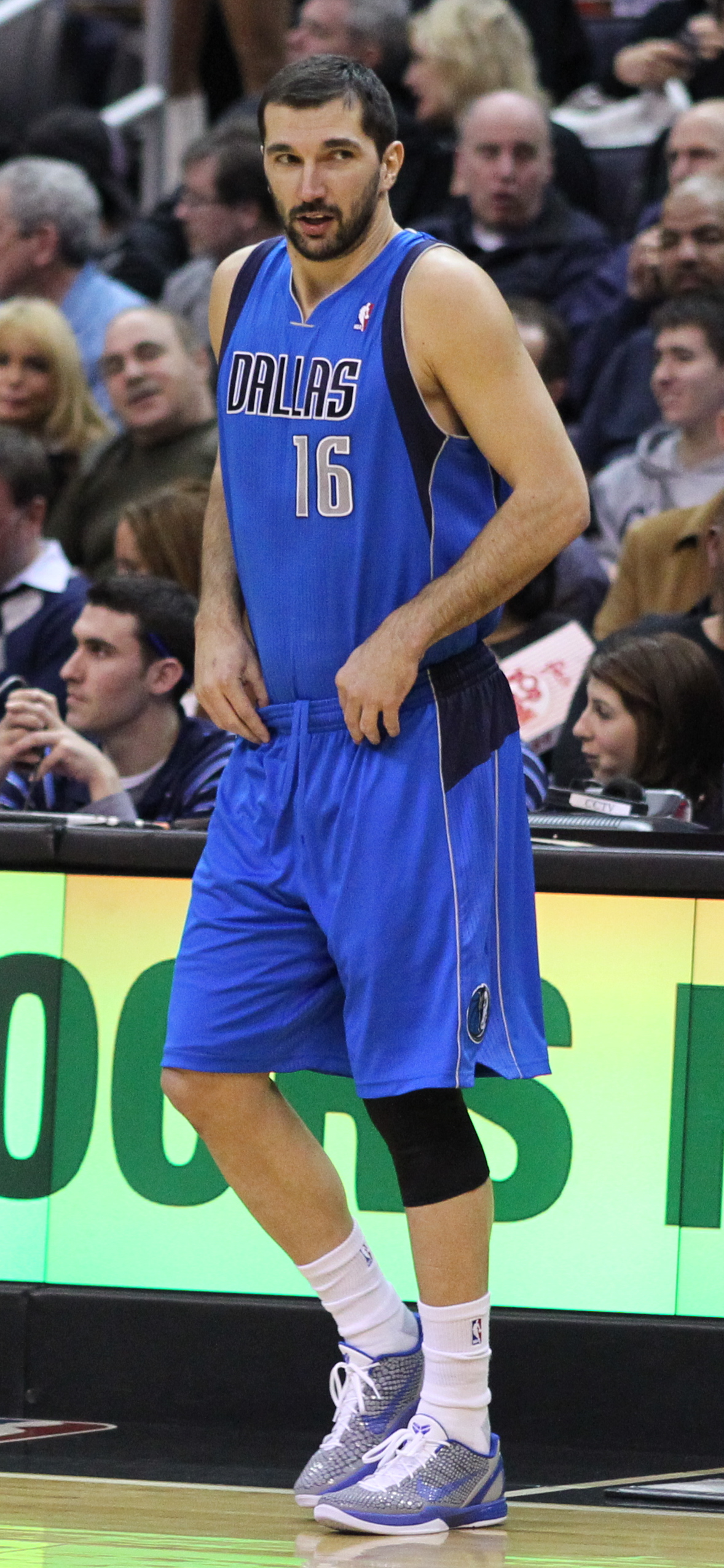 Wizards v/s Mavericks 02/26/11